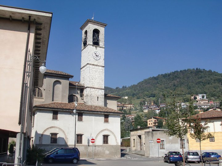 Chiesa di San Giorgio vista da Piazza Giuliano Berizzi